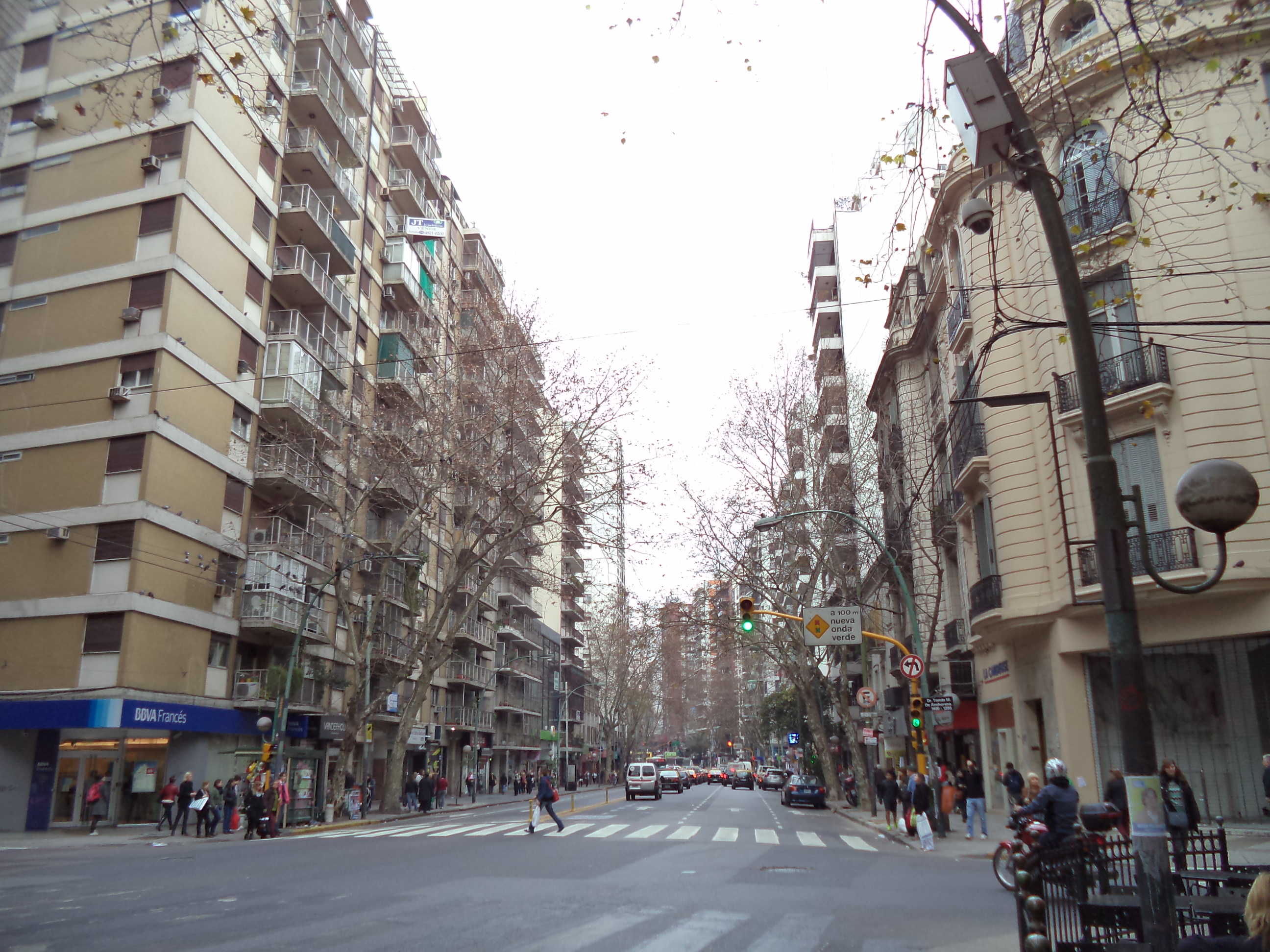 Vista de la Avenida Santa Fe desde la calle Anchorena hacia el centro de Buenos Aires.